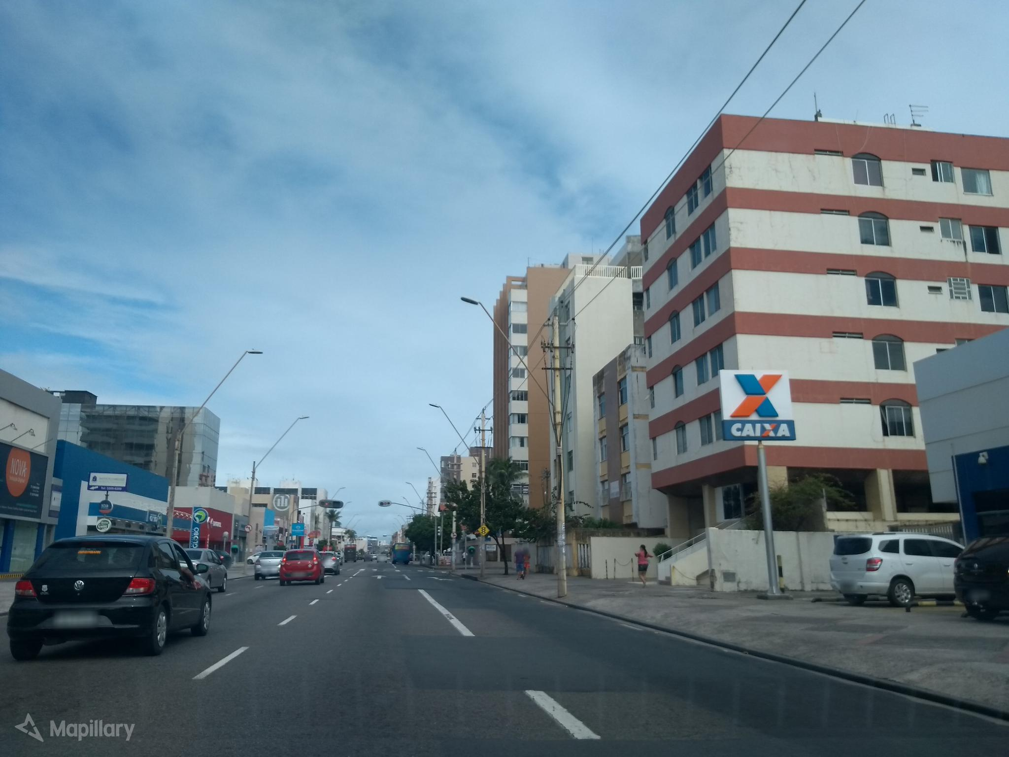 Avenida Manoel Dias da Silva, no bairro da Pituba, em Salvador